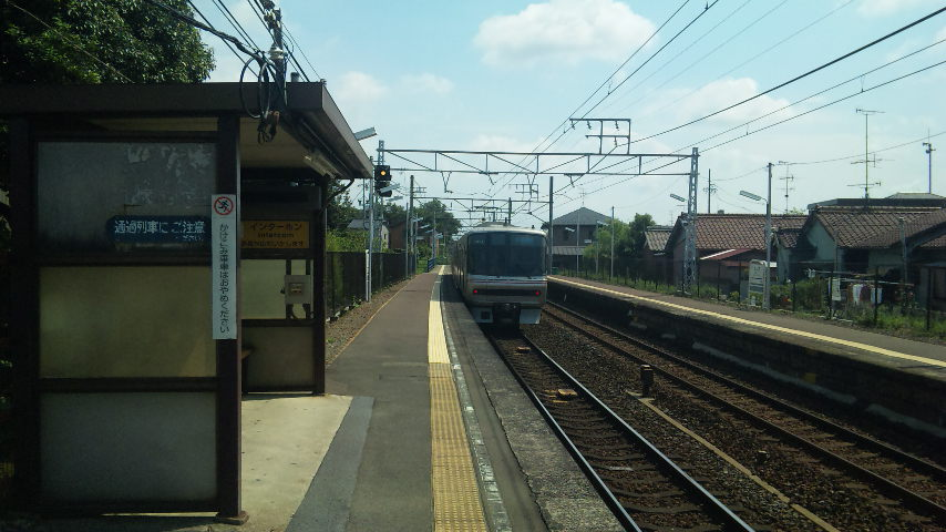 丸ノ内 須ヶ口方面